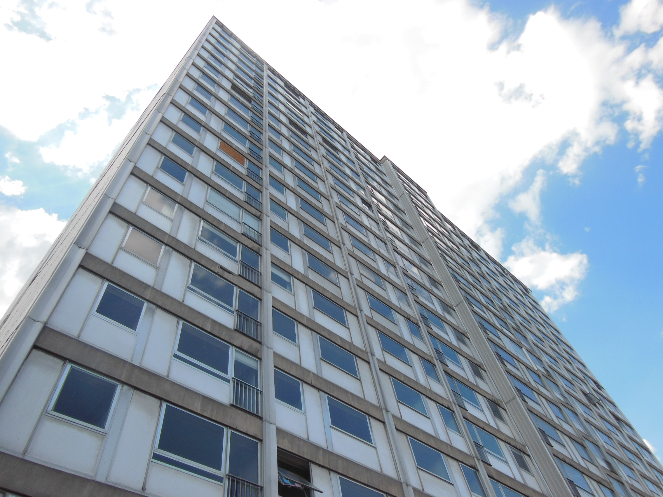 Een torenhoog leegstaand flatgebouw, op 2 juni 2019 toegankelijk voor bezoekers